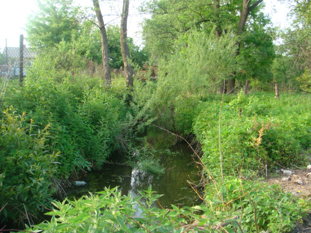 Річка Липка у межах с. Нагачів.